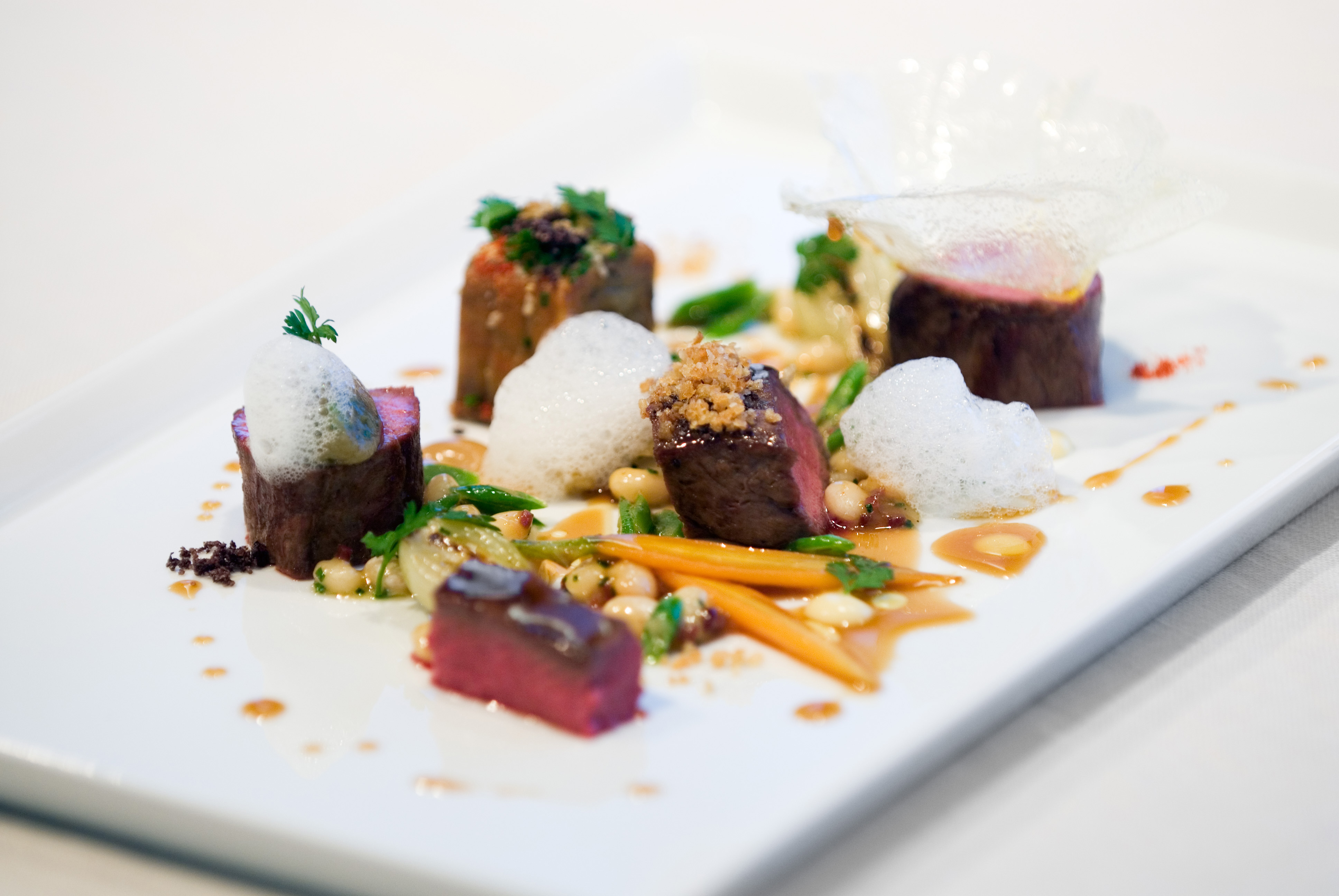 Mat från resturangen Chez Dominique i Helsingfors.Ny Nordisk Mat.